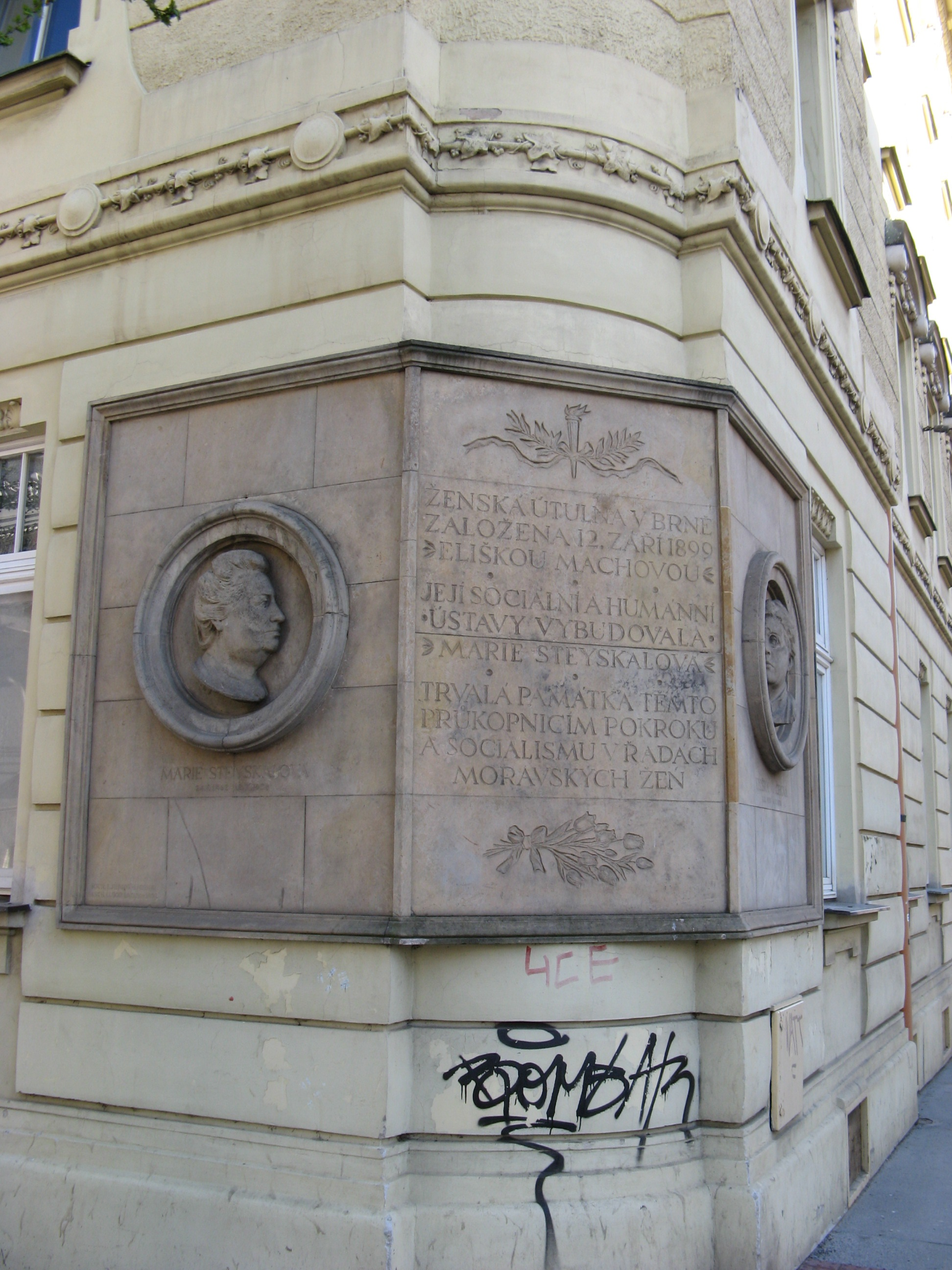 Pamětní deska na rohu ulic Gorkého a Úvozu v Brně - Ženská útulna v Brně, (Marie Alžběta Steyskalová (1862 – 1928) a Eliška Machová (1858 - 1926)